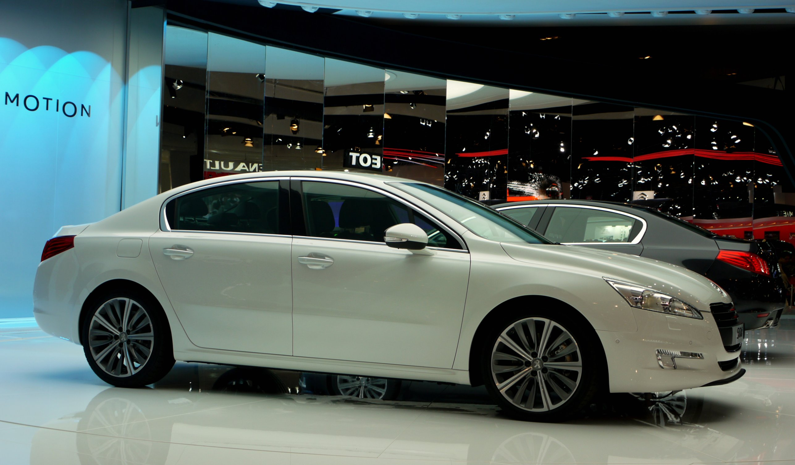 Peugeot 508 GT saloon.